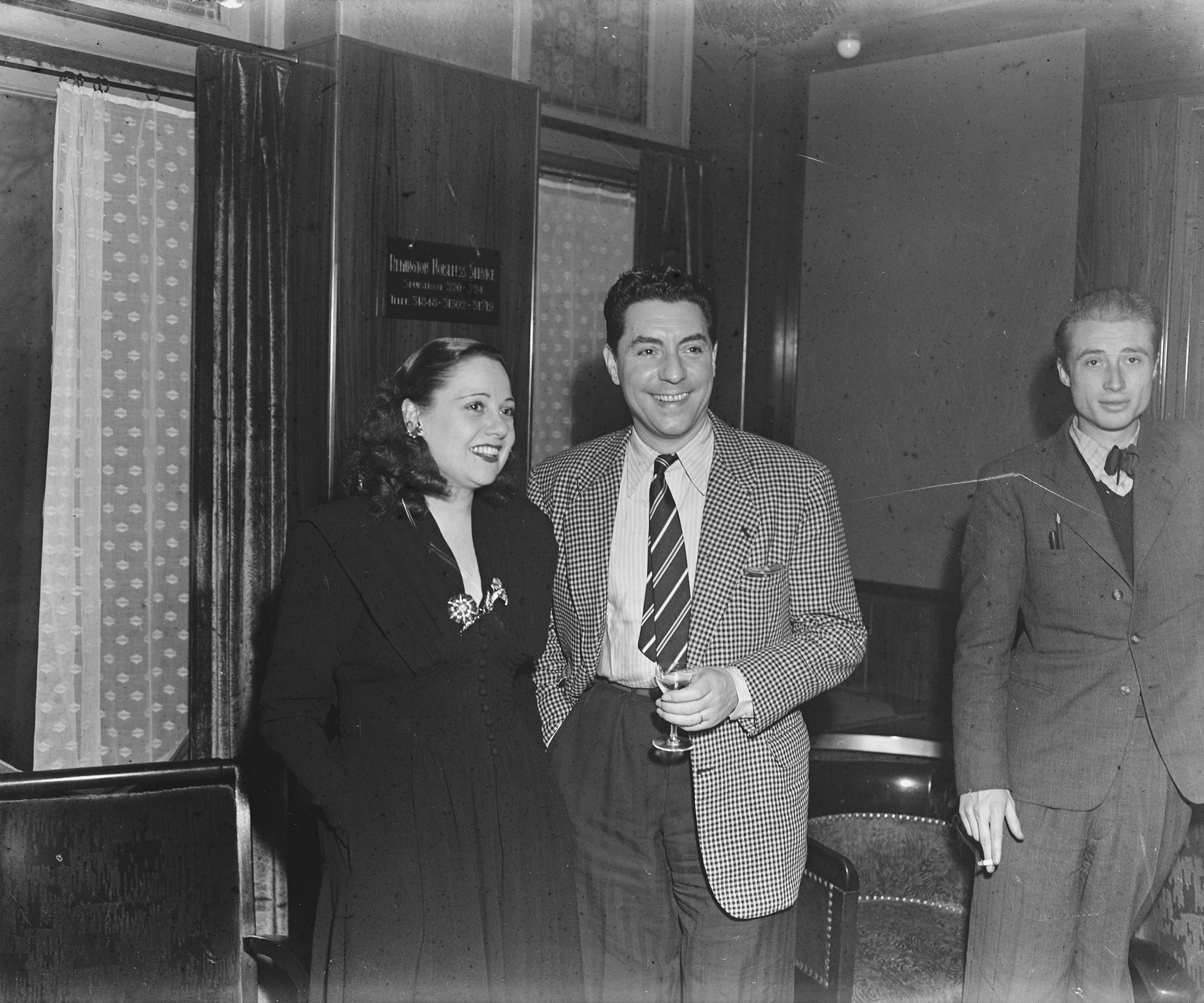 Collectie / Archief : Fotocollectie Anefo Reportage / Serie : [ onbekend ] Beschrijving : Lucienne Boyer en Jack Pills Datum : 14 december 1945 Persoonsnaam : Boyer, Lucienne, Jack Pills Fotograaf : Raucamp, Koos / Anefo Auteursrechthebbende : Nationaal Archief Materiaalsoort : Glasnegatief Nummer archiefinventaris : bekijk toegang 2.24.01.09 Bestanddeelnummer : 901-2468